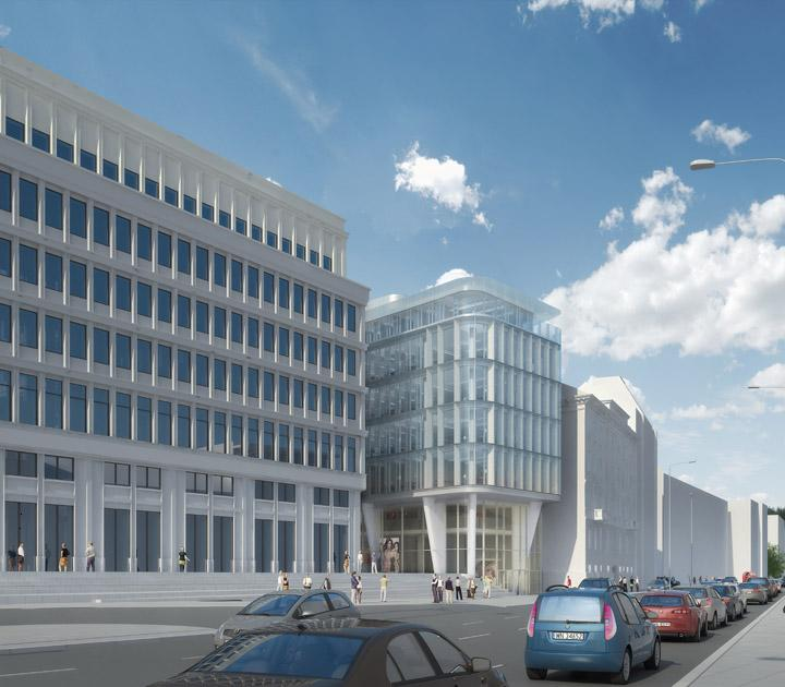 Rozbudowa i przebudowa Domu Partii przy ulicy Nowy Świat w Warszawie